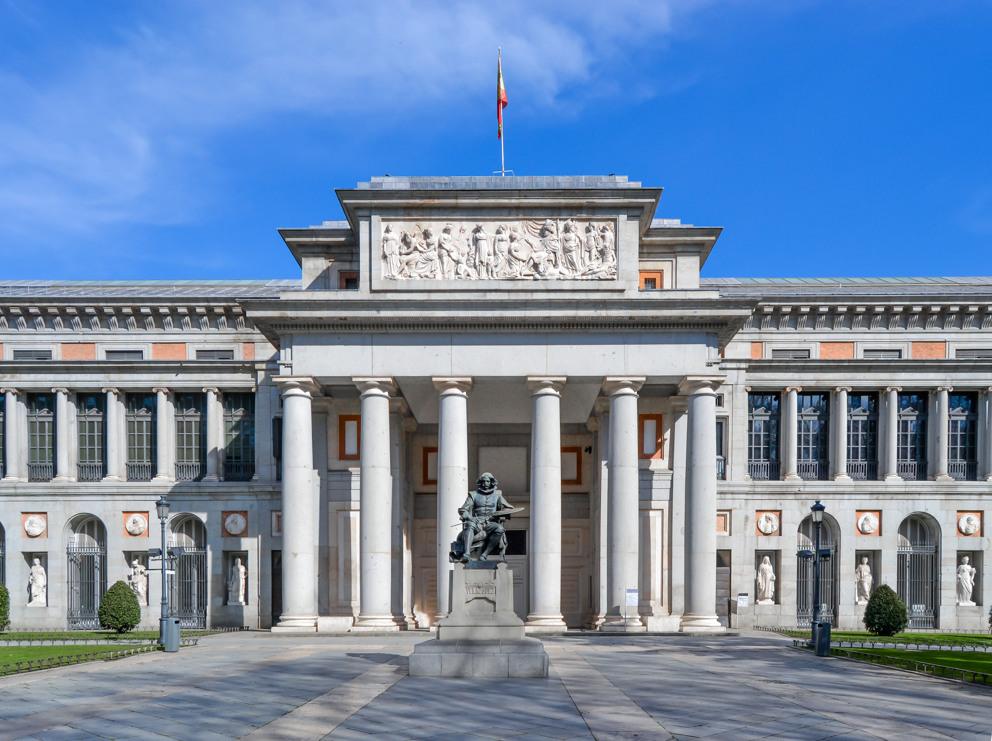 El Museo del Prado en 2016, Madrid, España.